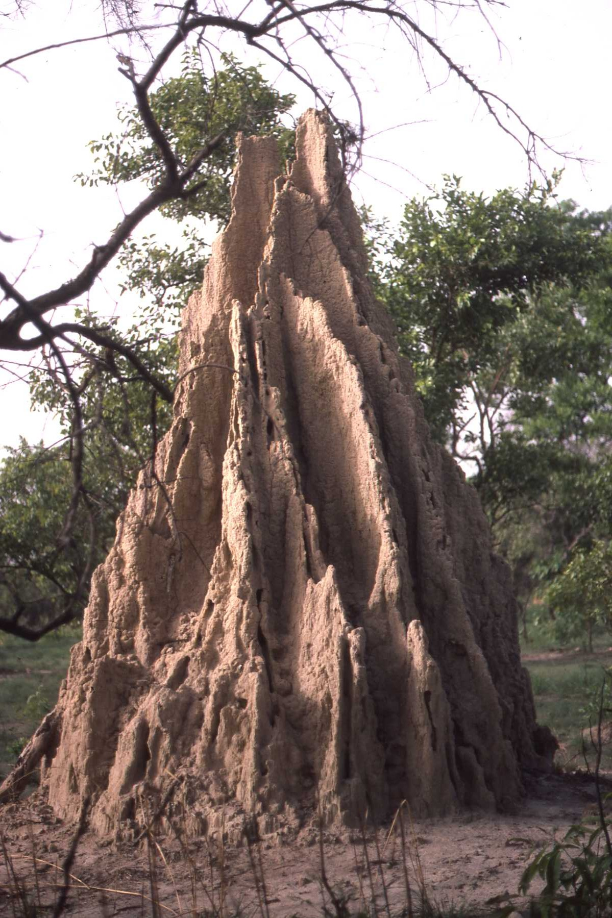 Termitière de la region de Boundiali, en Cote d'Ivoire